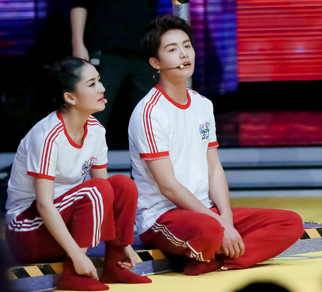 160419 快本录制